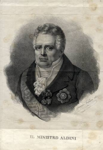 Ritratto del Ministro Antonio Aldini (1755 - 1826) - Bologna